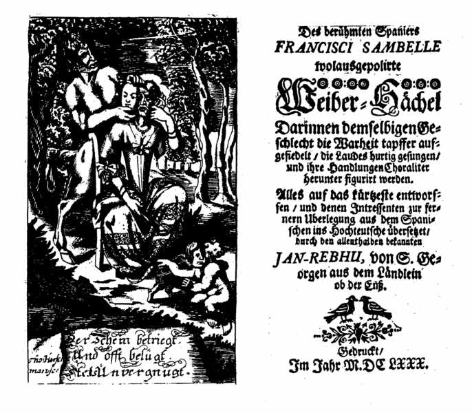 Titel des Romans "Des berühmten Spaniers Francisci Sambelle wolausgepolirte Weiber-Hächel" von Johann Beer, 1680